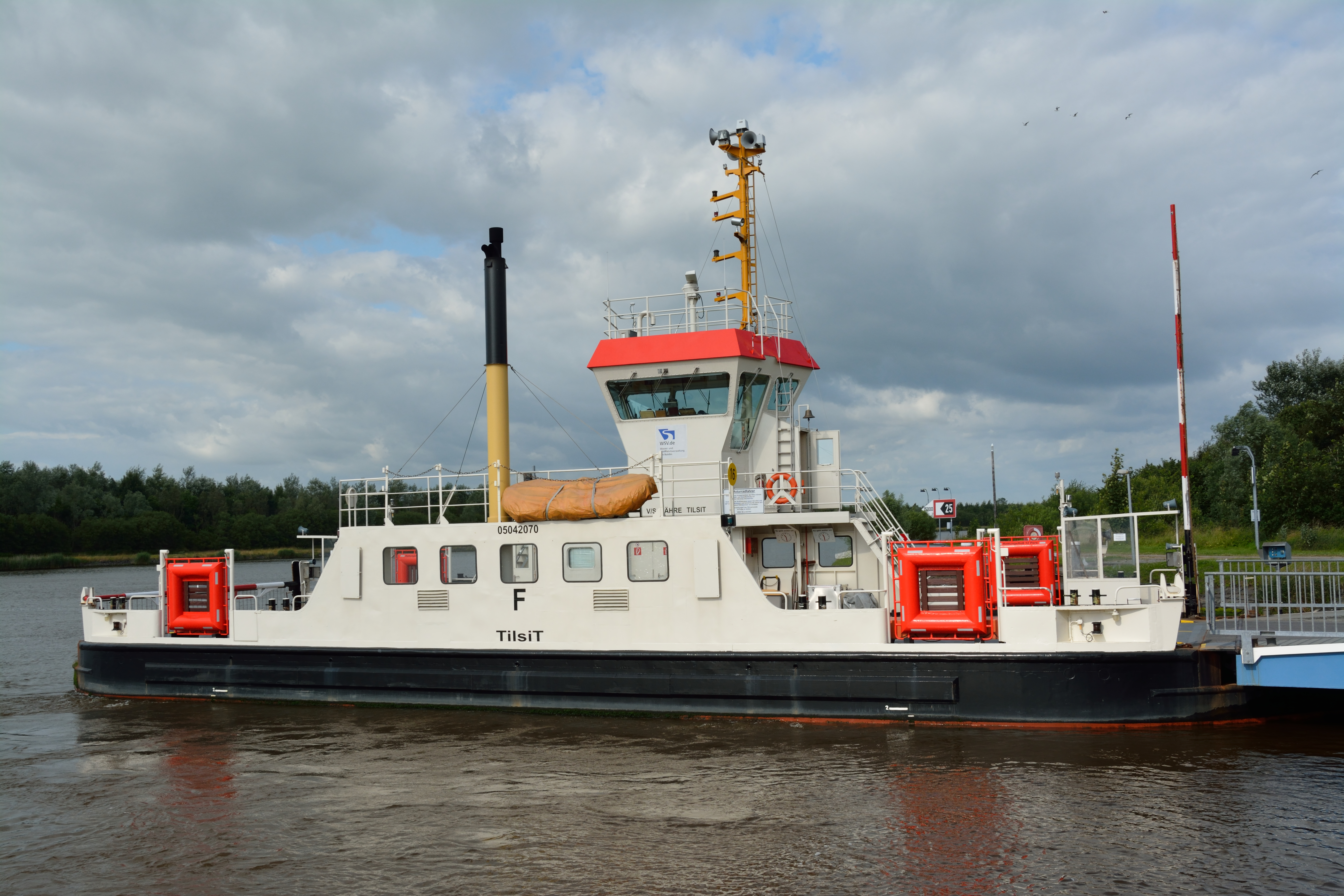 Oldenbüttel, Fähre "Tilsit" über den Nord-Ostsee-Kanal